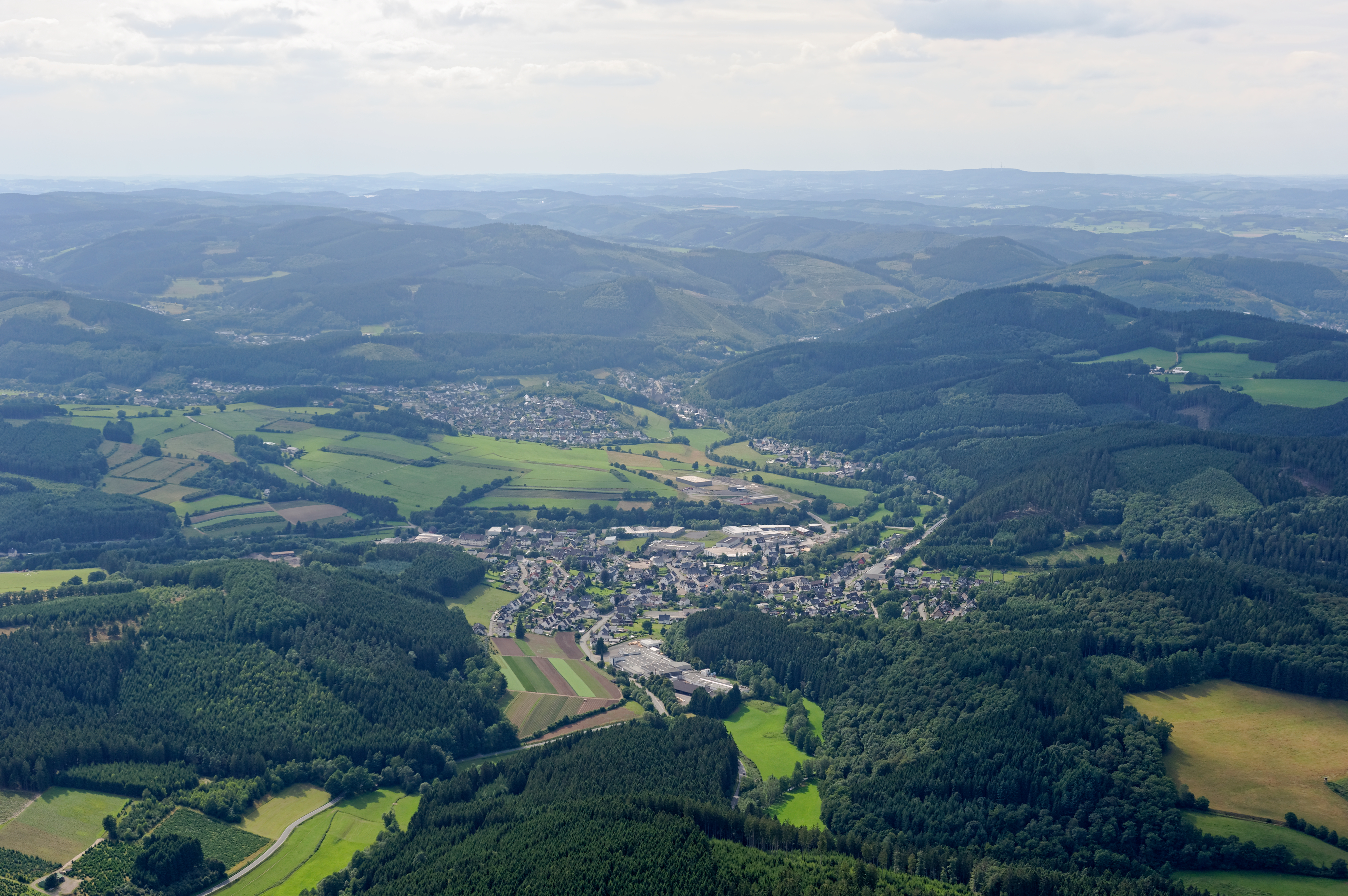 Fotoflug Sauerland West. Blick auf Kirchhundem-Würdinghausen, dahinter Kirchhundem. The making of this document was supported by the Community-Budget of Wikimedia Germany.